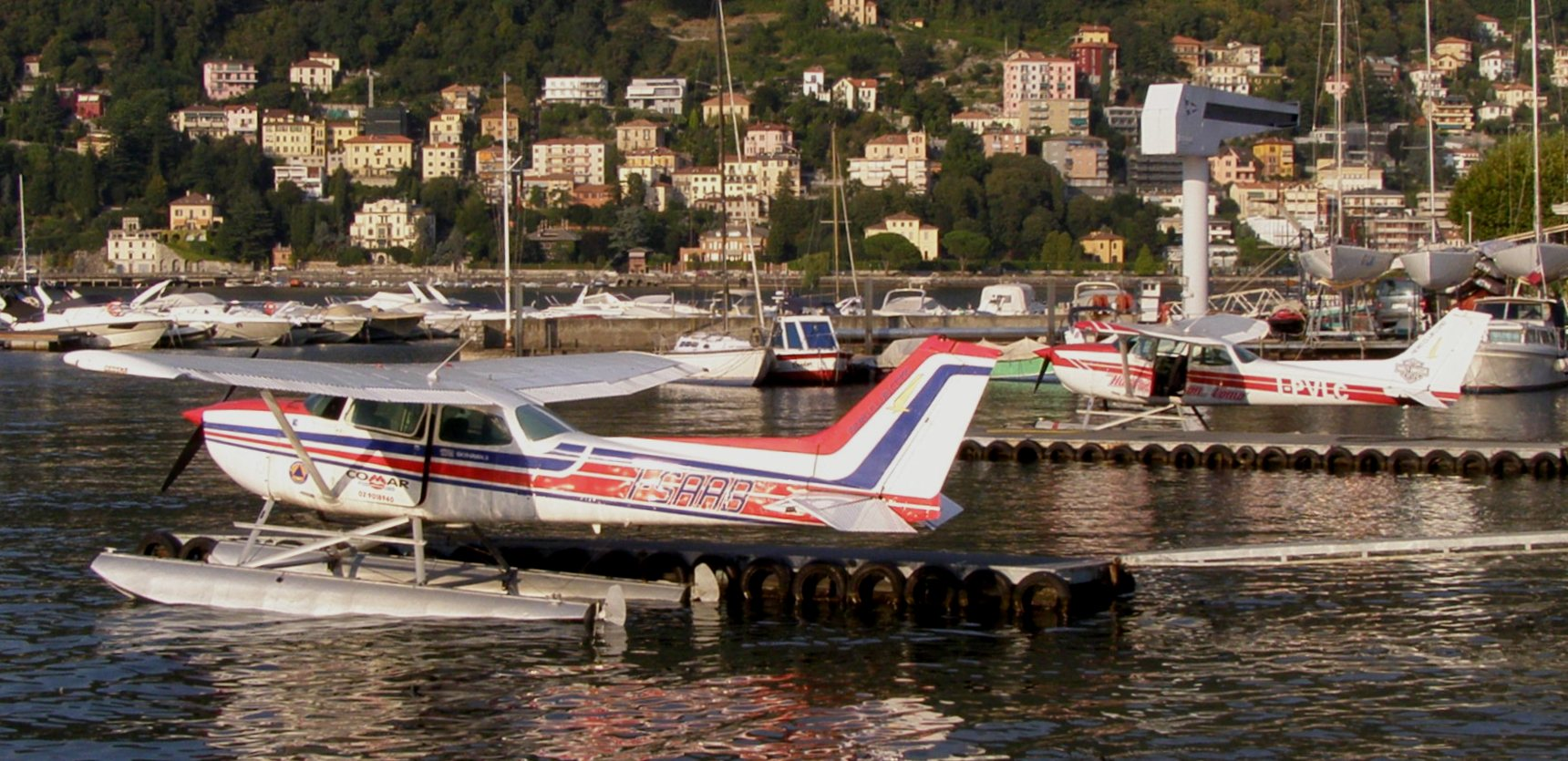 L'idroscalo per idrovolanti, a Como. Unknown